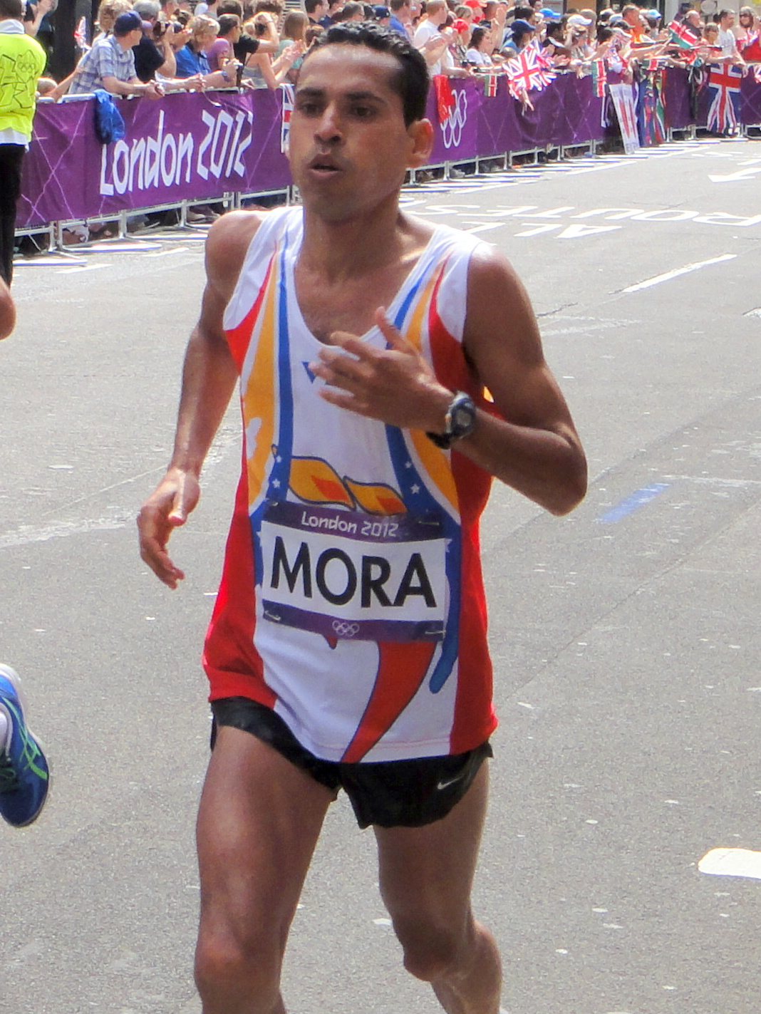 Cesar Lizano (Costa Rica) & Pedro Mora (Venezuela) - London 2012 Men's Marathon